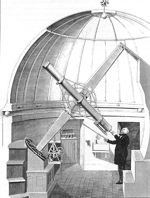 Telescopio de 6 pulgadas en el observatorio de Bedfod